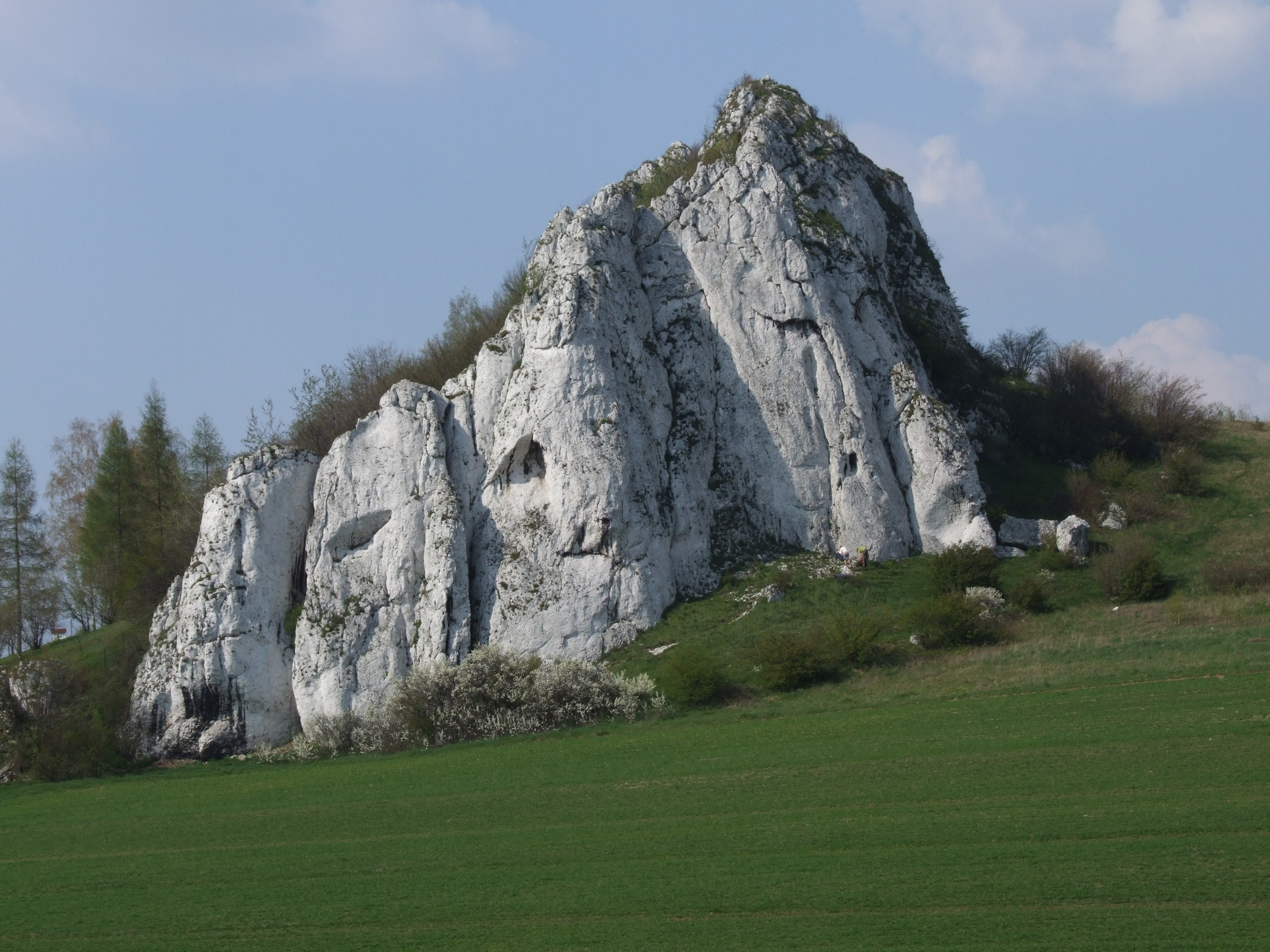 Skała Fiala (z grupy Ostańców Jerzmanowickich. Widok od południowej strony)